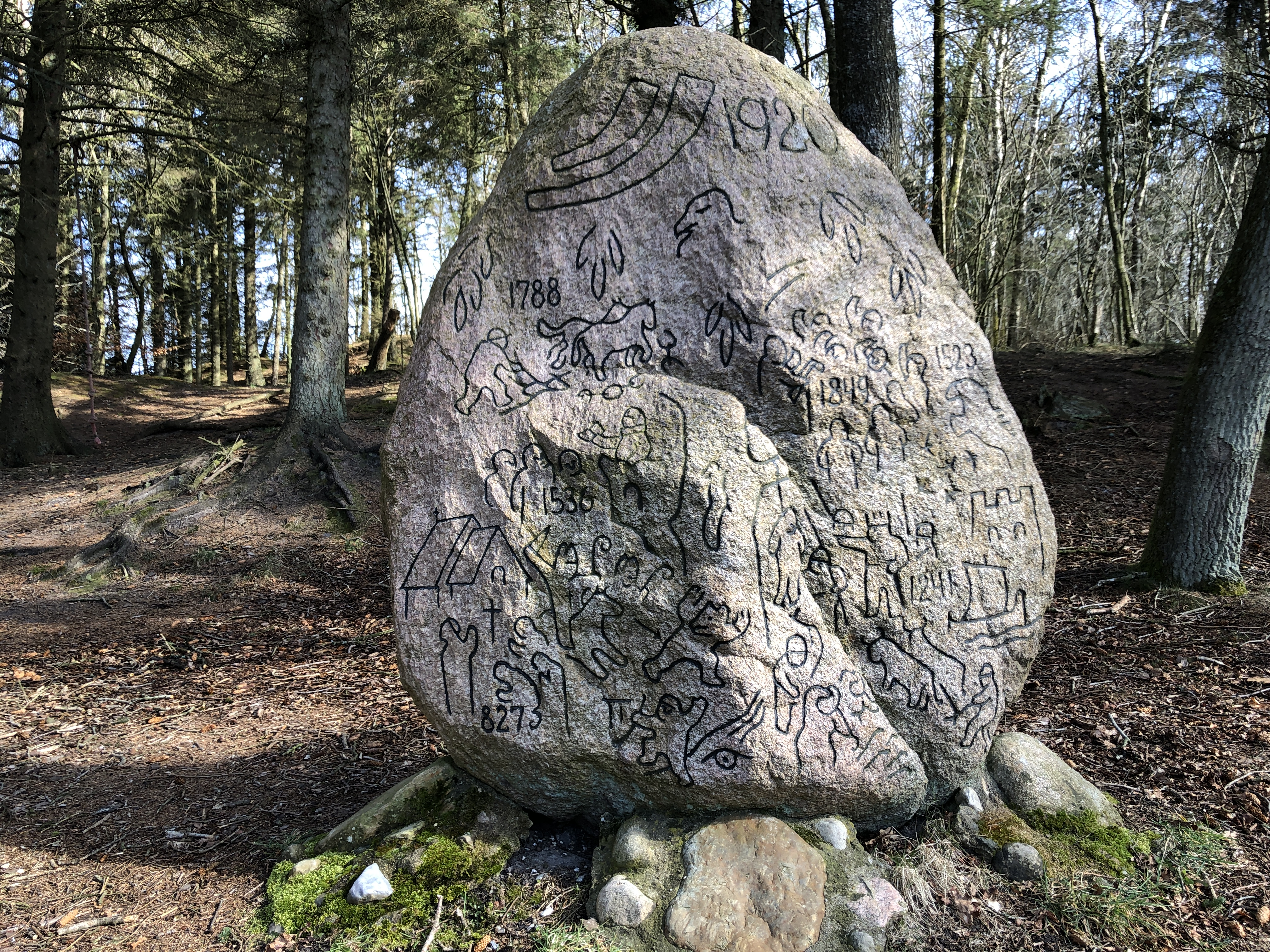 Historiens Sten, hugget og rejst af skolelærer Alfred Kaae i 1938. Billedet er taget af Peter Leth d. 4. april 2020. cc-by-sa Peter Leth